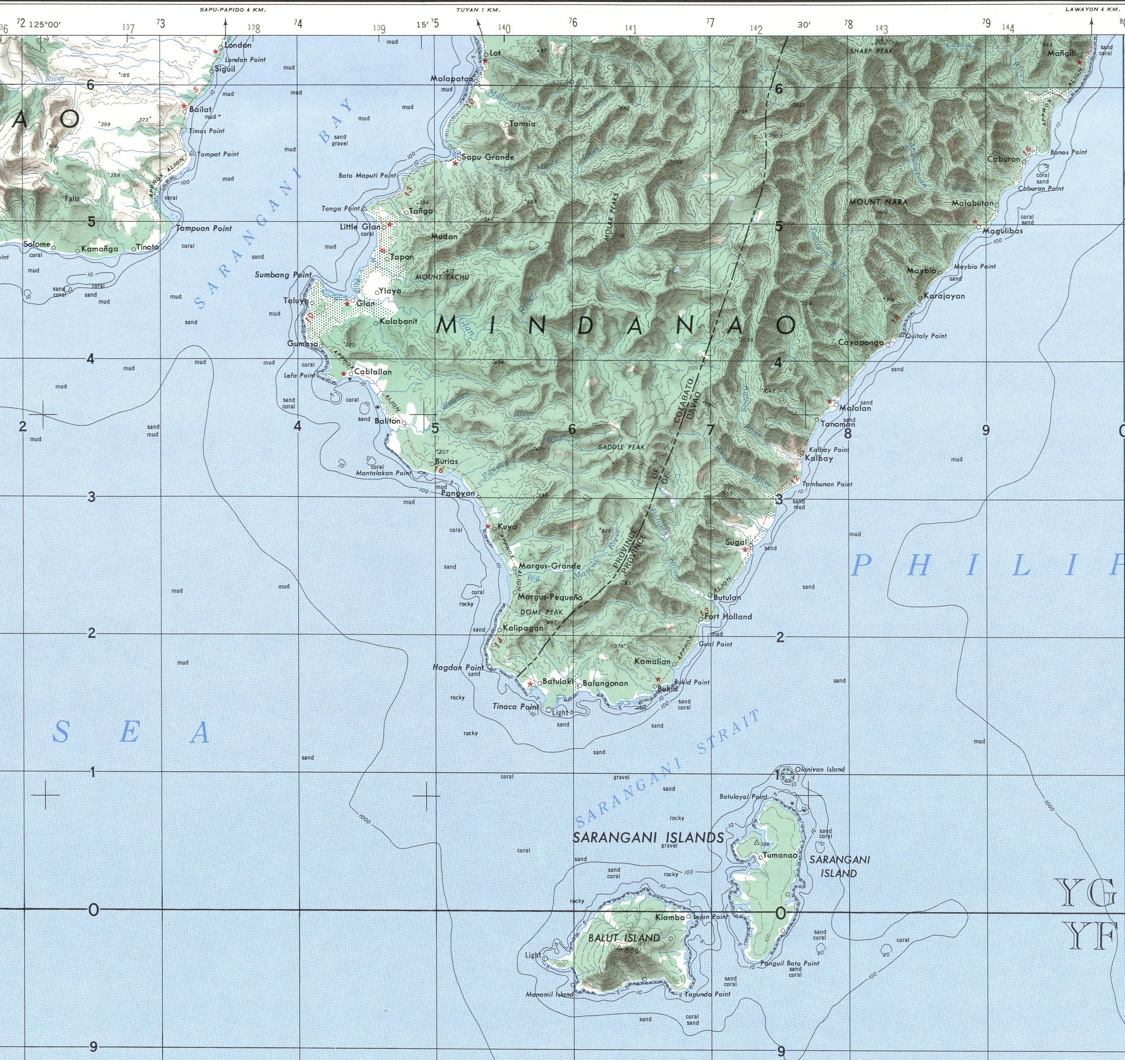 fragmento hoja NB 51-12 Caburan que comprende el sur de al bahía de Sansangani Philippines 1:250,000 Series S501, U.S. Army Map Service, 1954